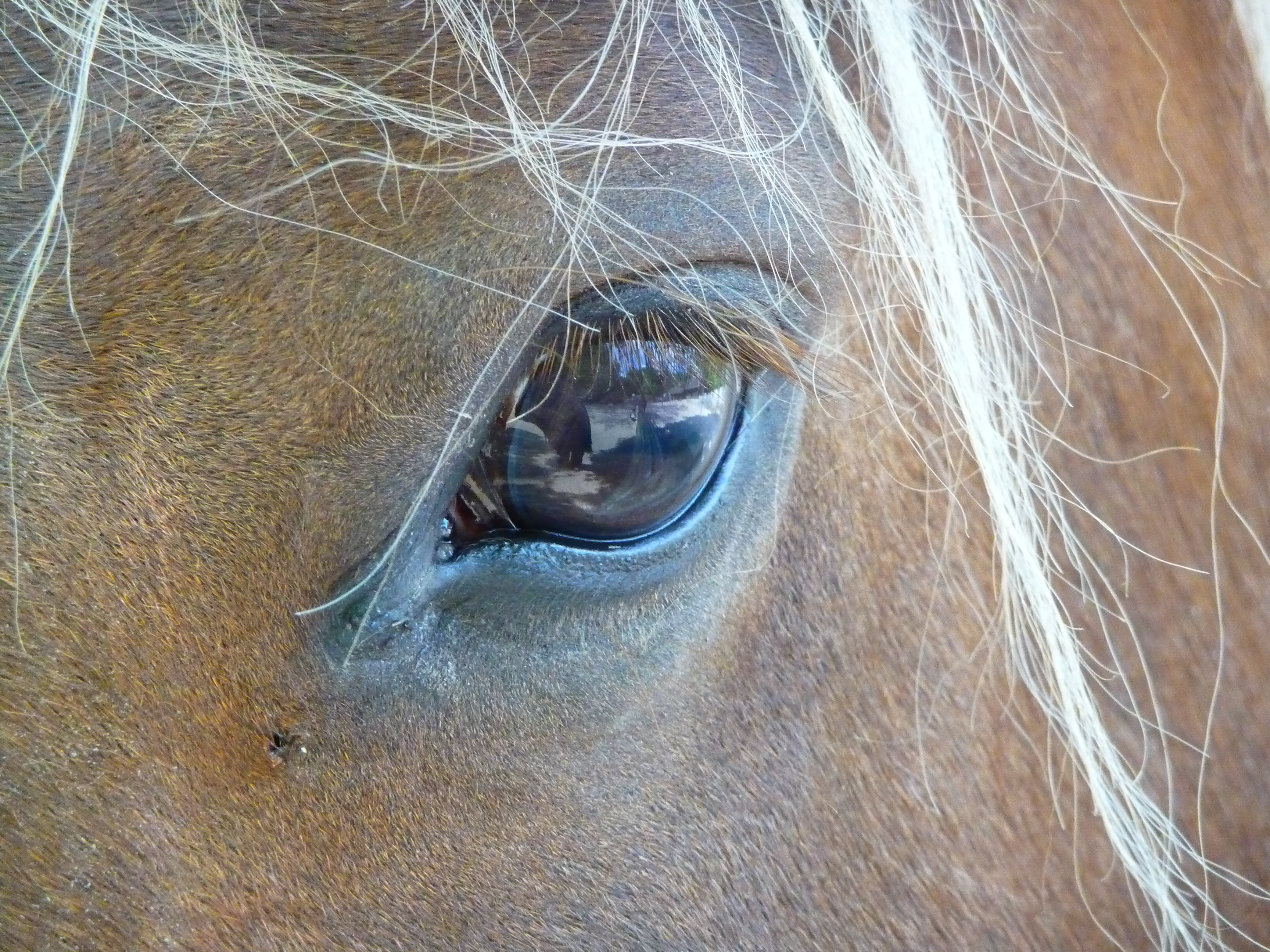 Nahaufnahme des Auges eines Schwarzwälder Fuchs (Equus caballus)